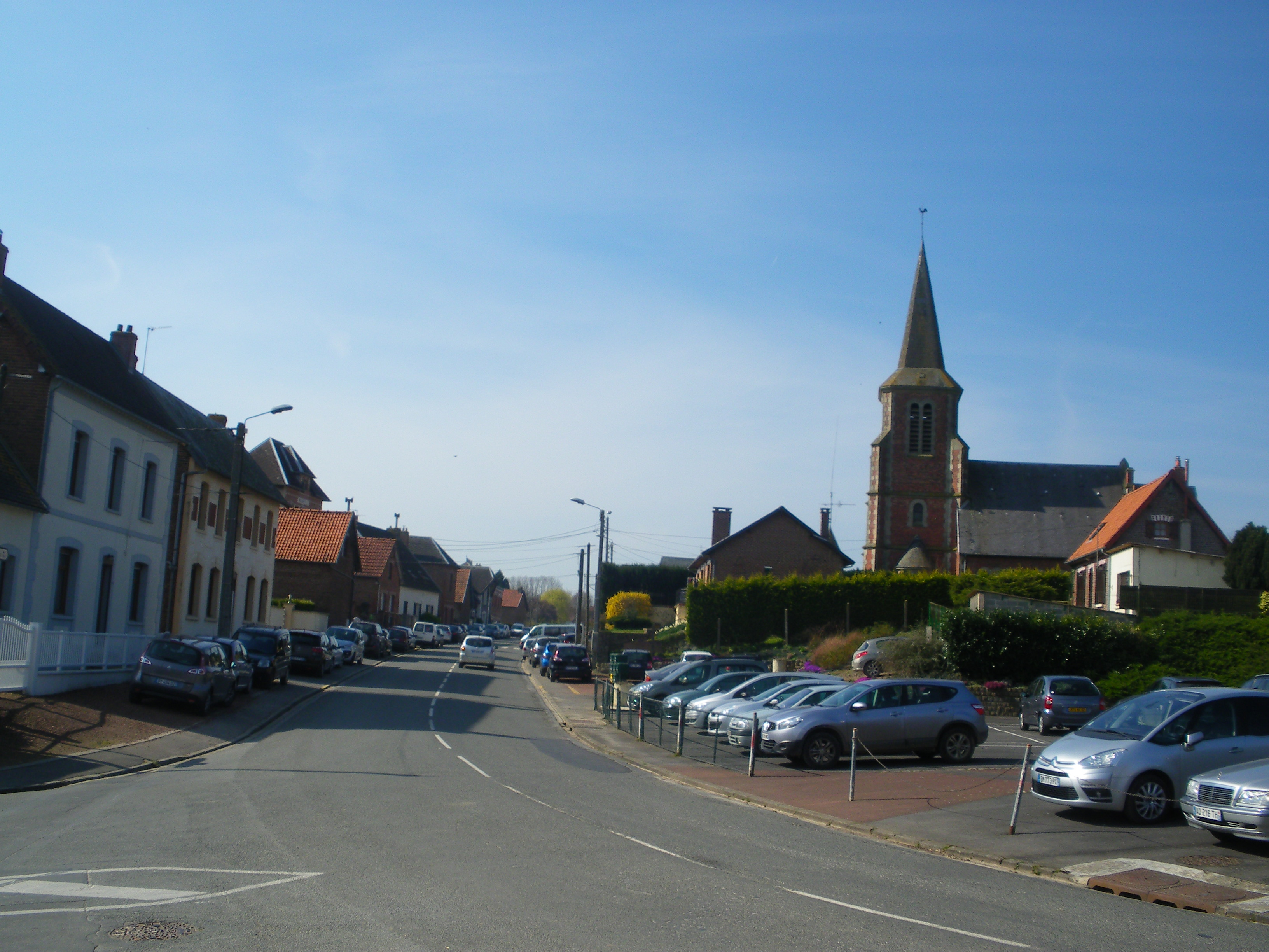 Vue de la commune de Moyenneville.